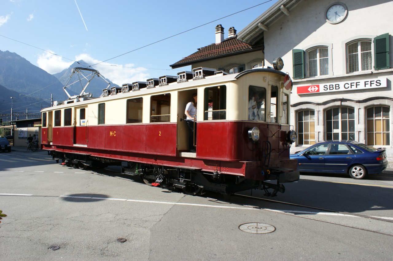 historisches Fahrzeug ABDeh 4/4 32 Martigny–Châtelard fährt über den Bahnhofplatz Martigny zur Remise des Train Nostalgique du Trient (TNT)